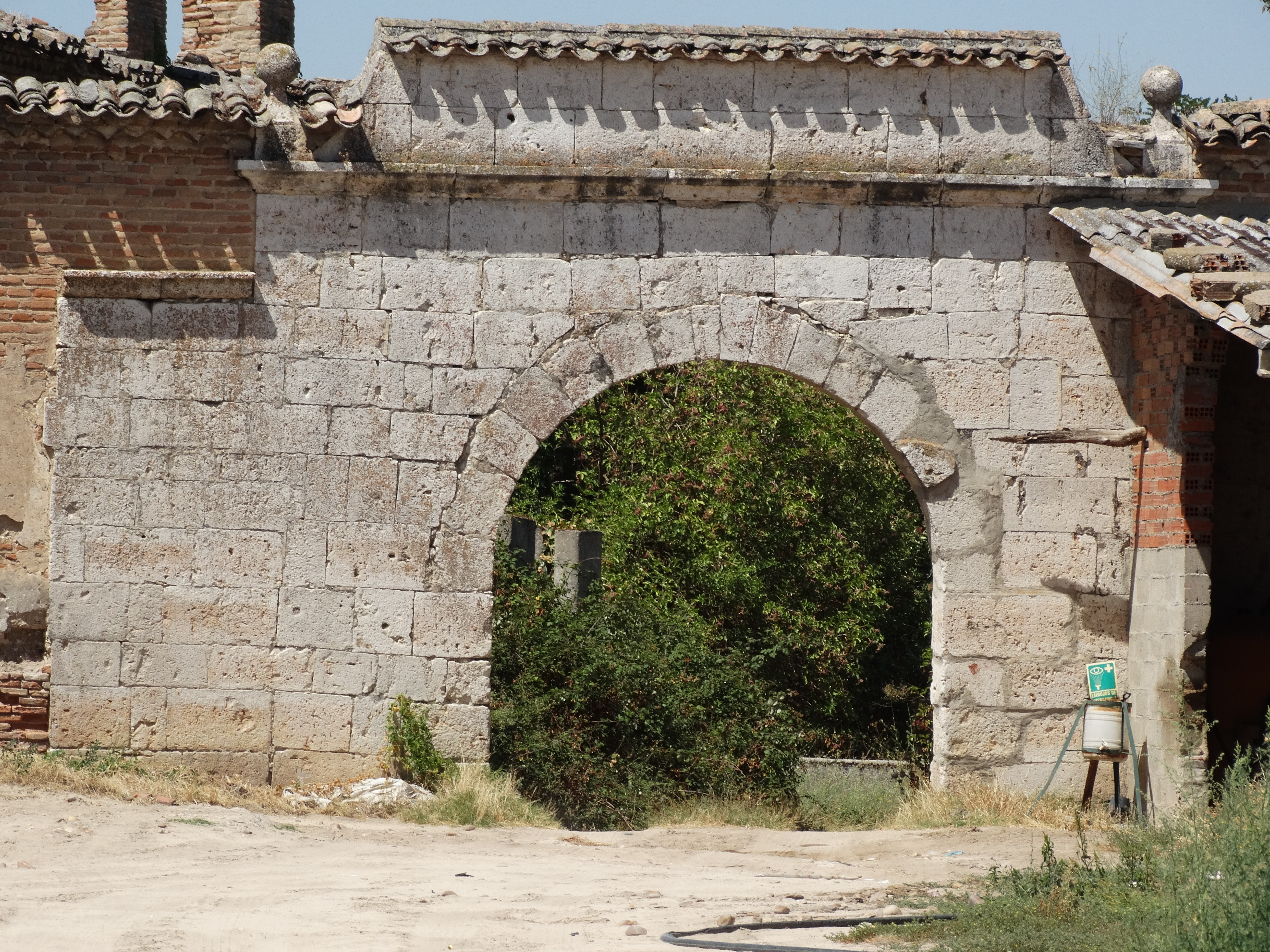 Ruinas del despoblado de Aniago en Valladolid, España. Entrada al monasterio